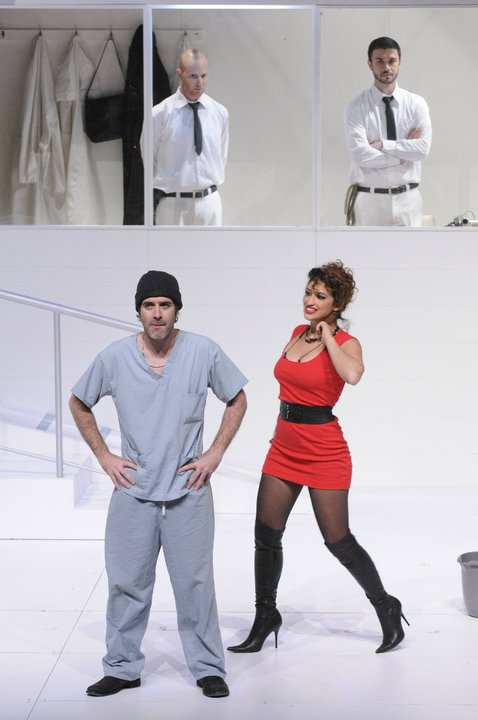 מירב שירום בהצגה קן הקוקיה